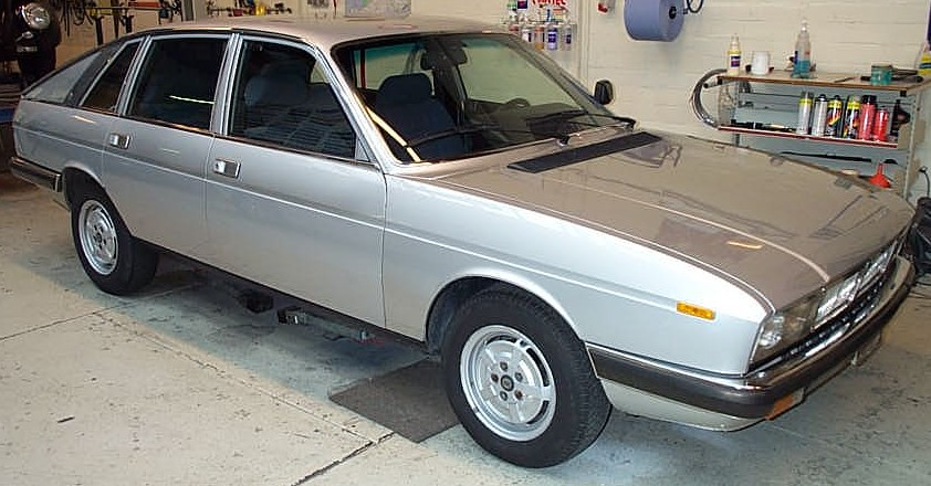 Lancia Gamma sedan/saloon 1980